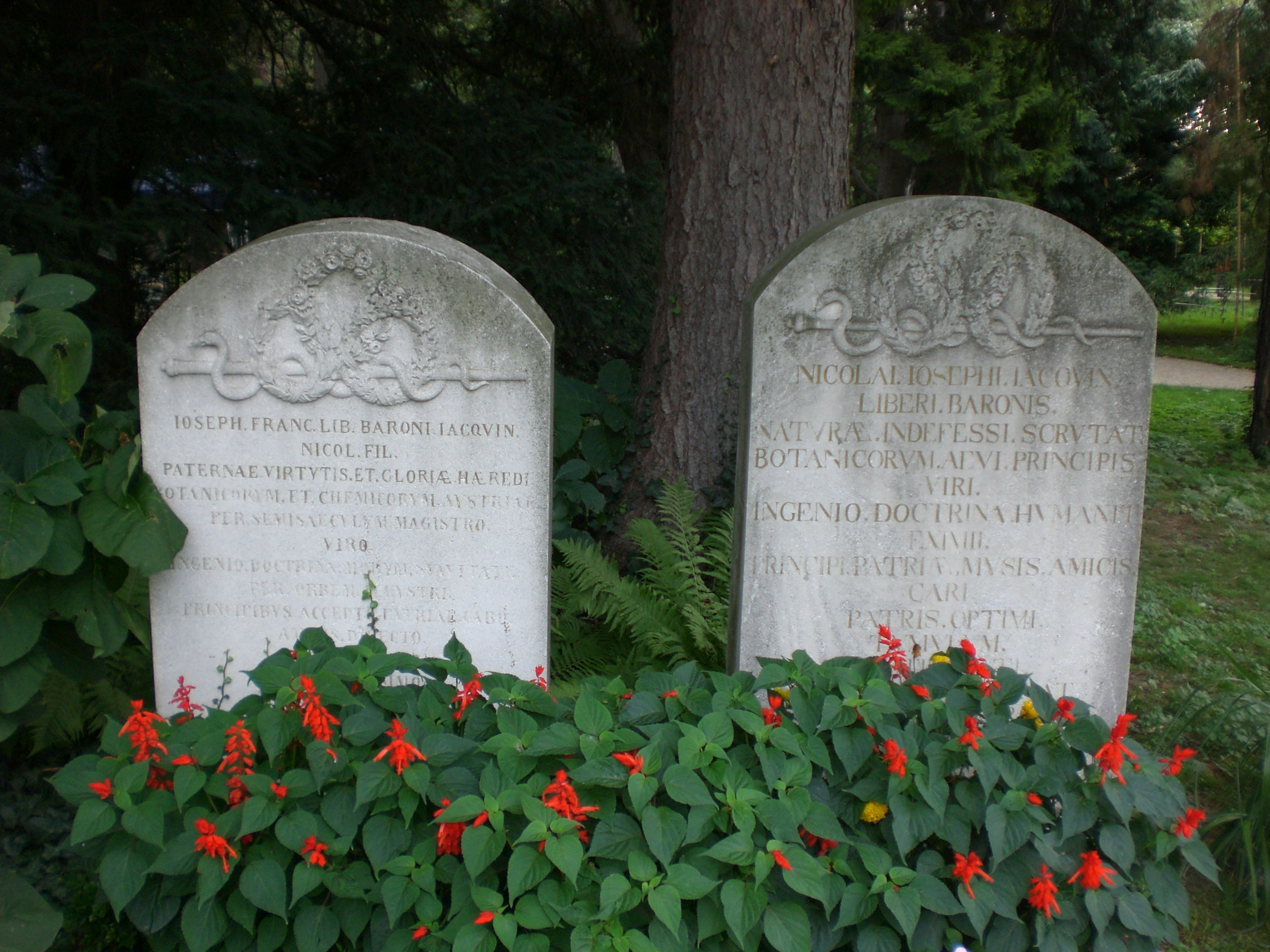 Gedenktafel für Nikolaus Joseph von Jacquin und Joseph Franz von Jacquin im Botanischer Garten der Universität Wien